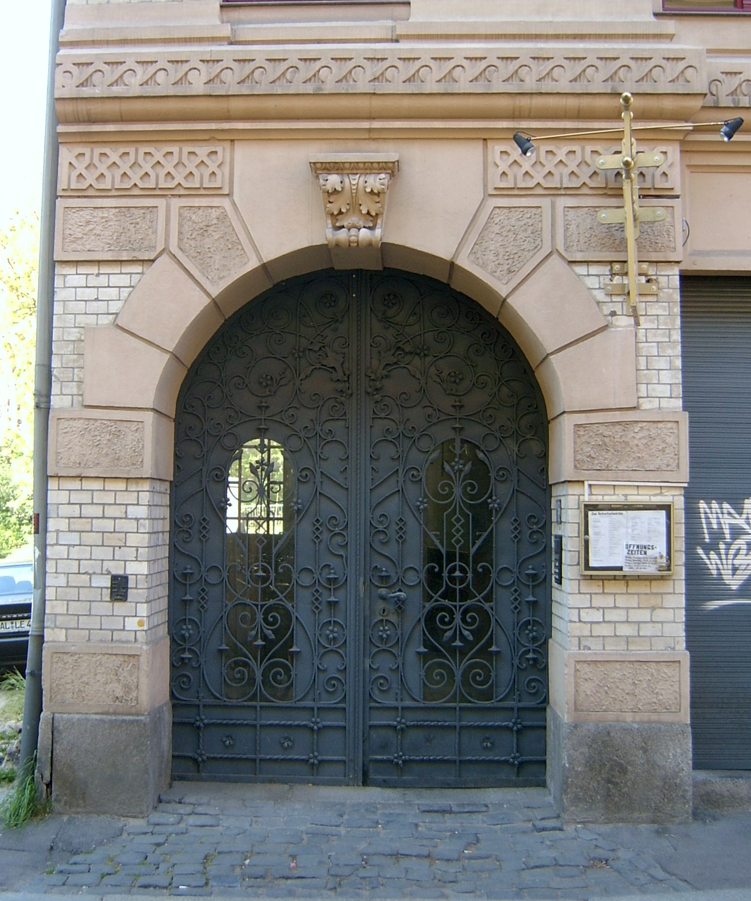 Große Märkerstr. 18 in Halle (Saale)